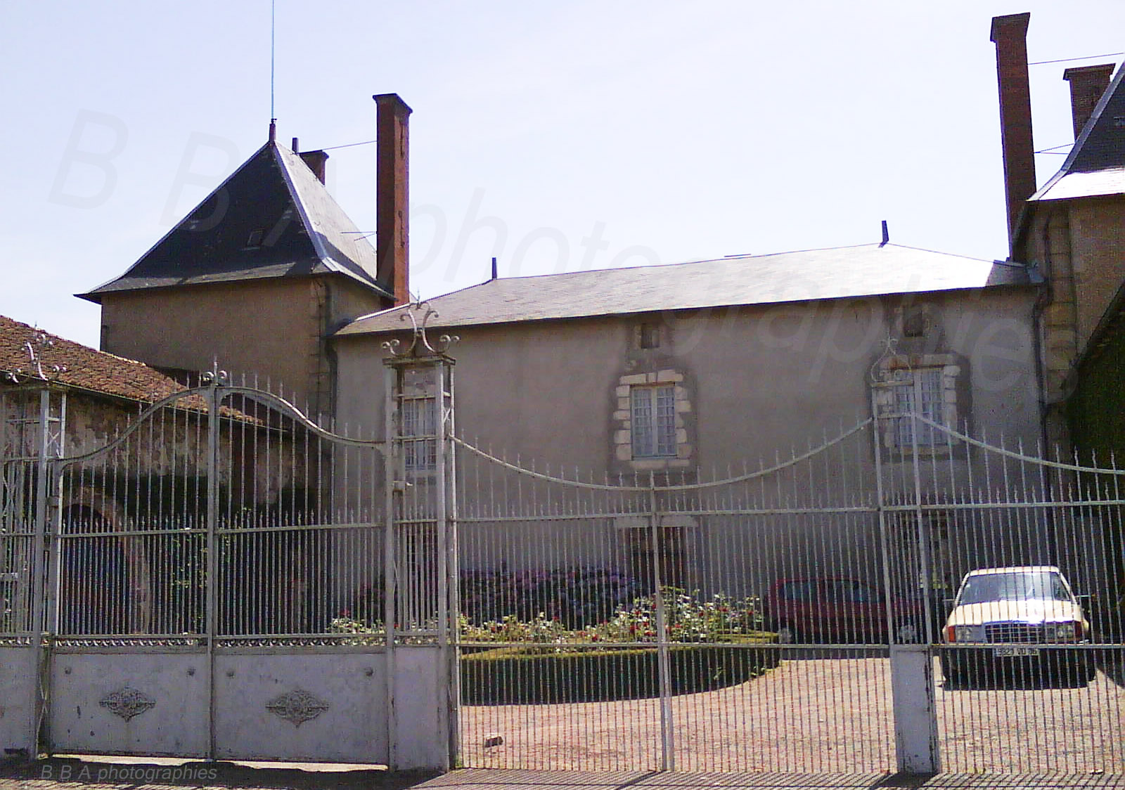 manoir de Brillac, Charente, France